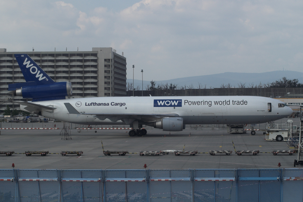 Lufthansa Cargo MD-11F D-ALCE